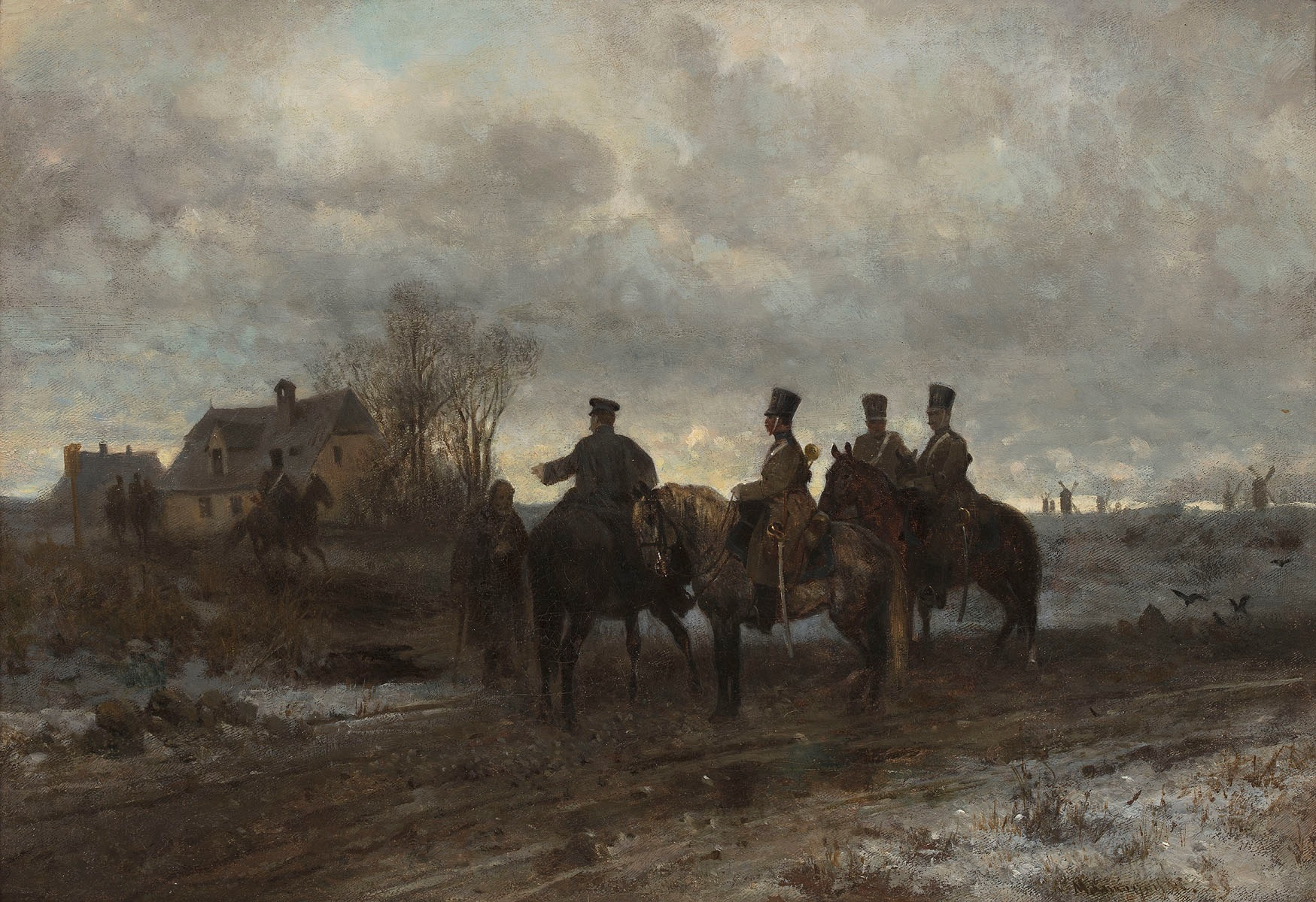 Patrol polski w 1830 roku